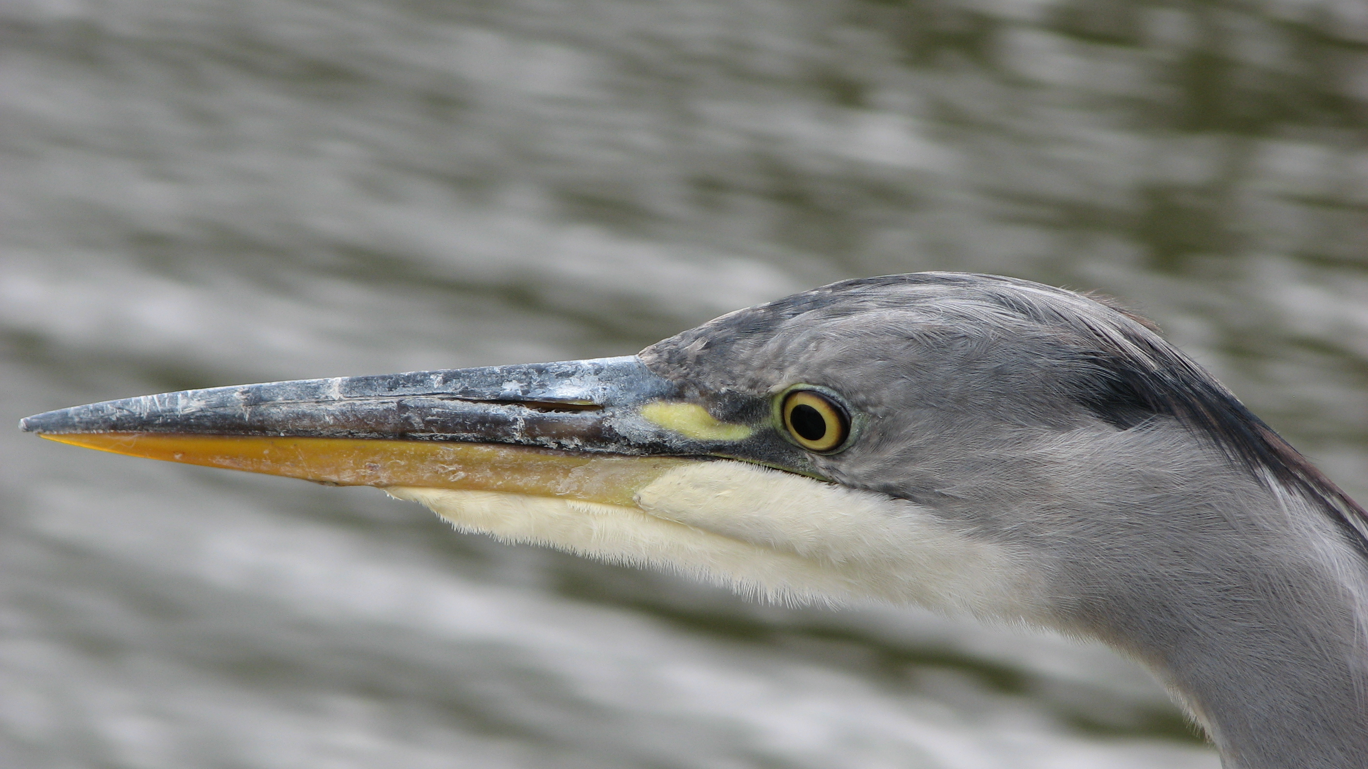 Kew Gardens - London - September 2008